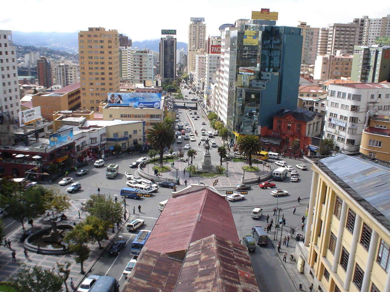 La Paz, Bolivia